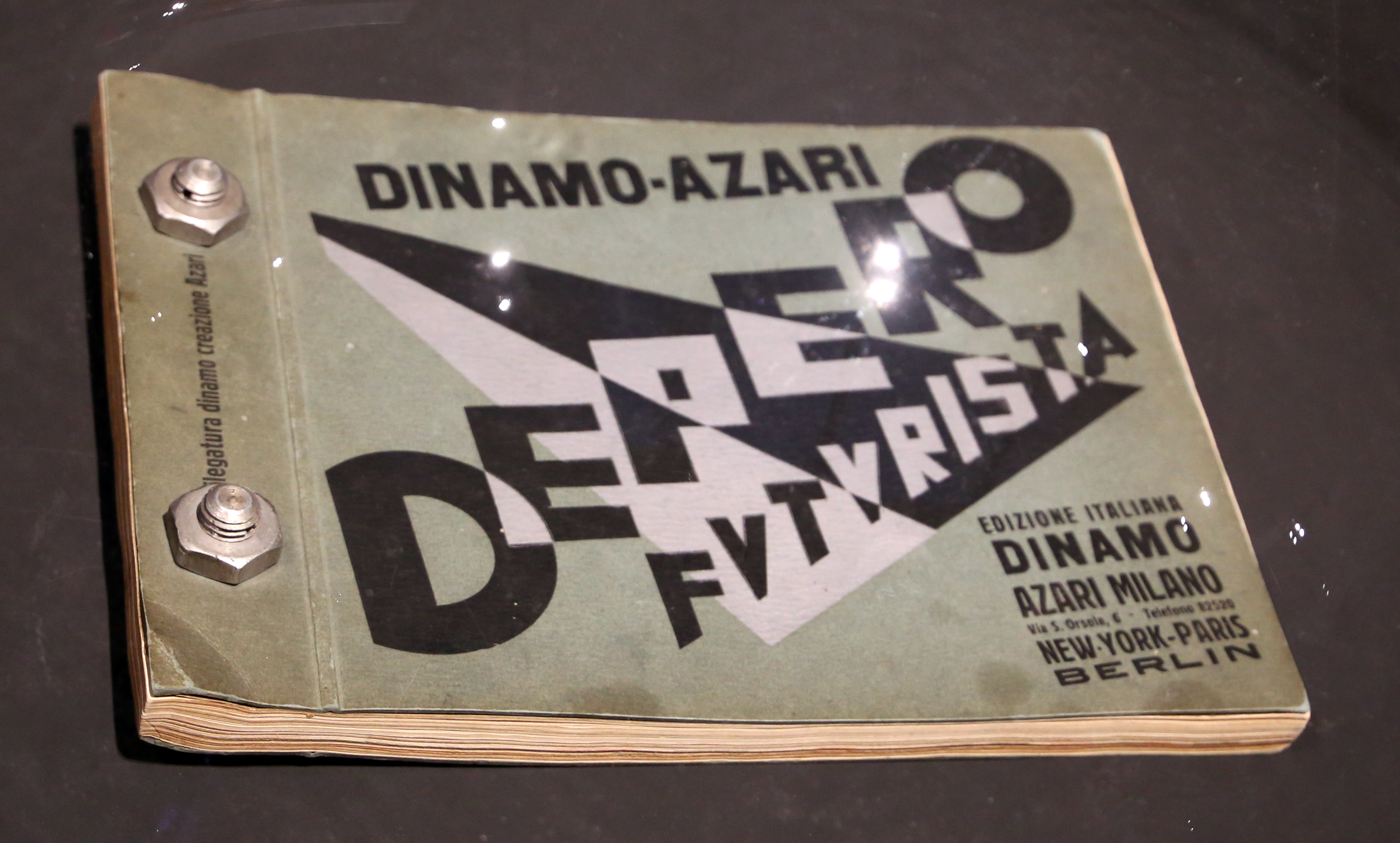 palazzo dell'Arte This is a photo of a monument which is part of cultural heritage of Italy.